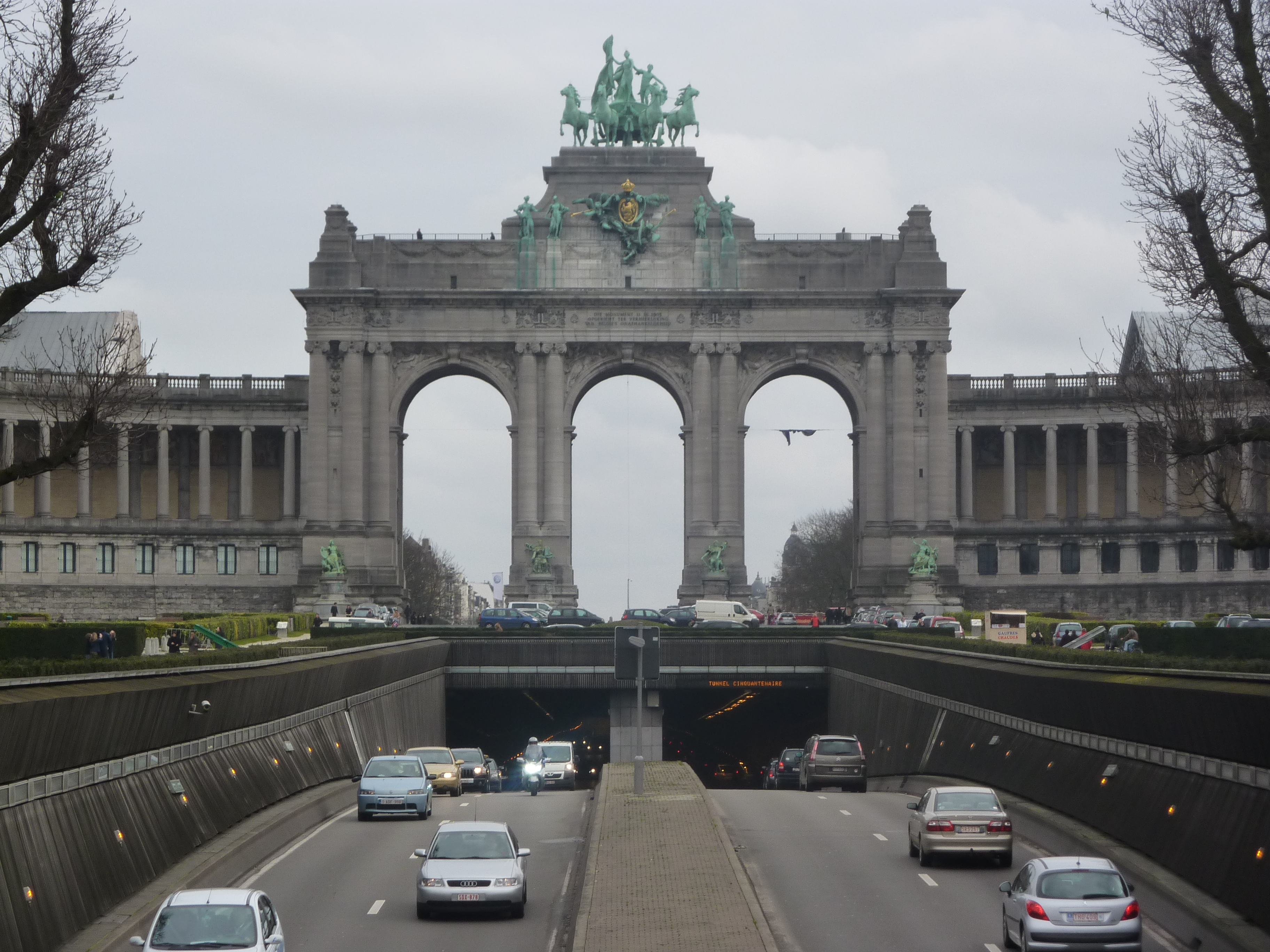 Arcades du Cinquantenaire et tunnel du Cinquantenaire à Bruxelles, Belgique.